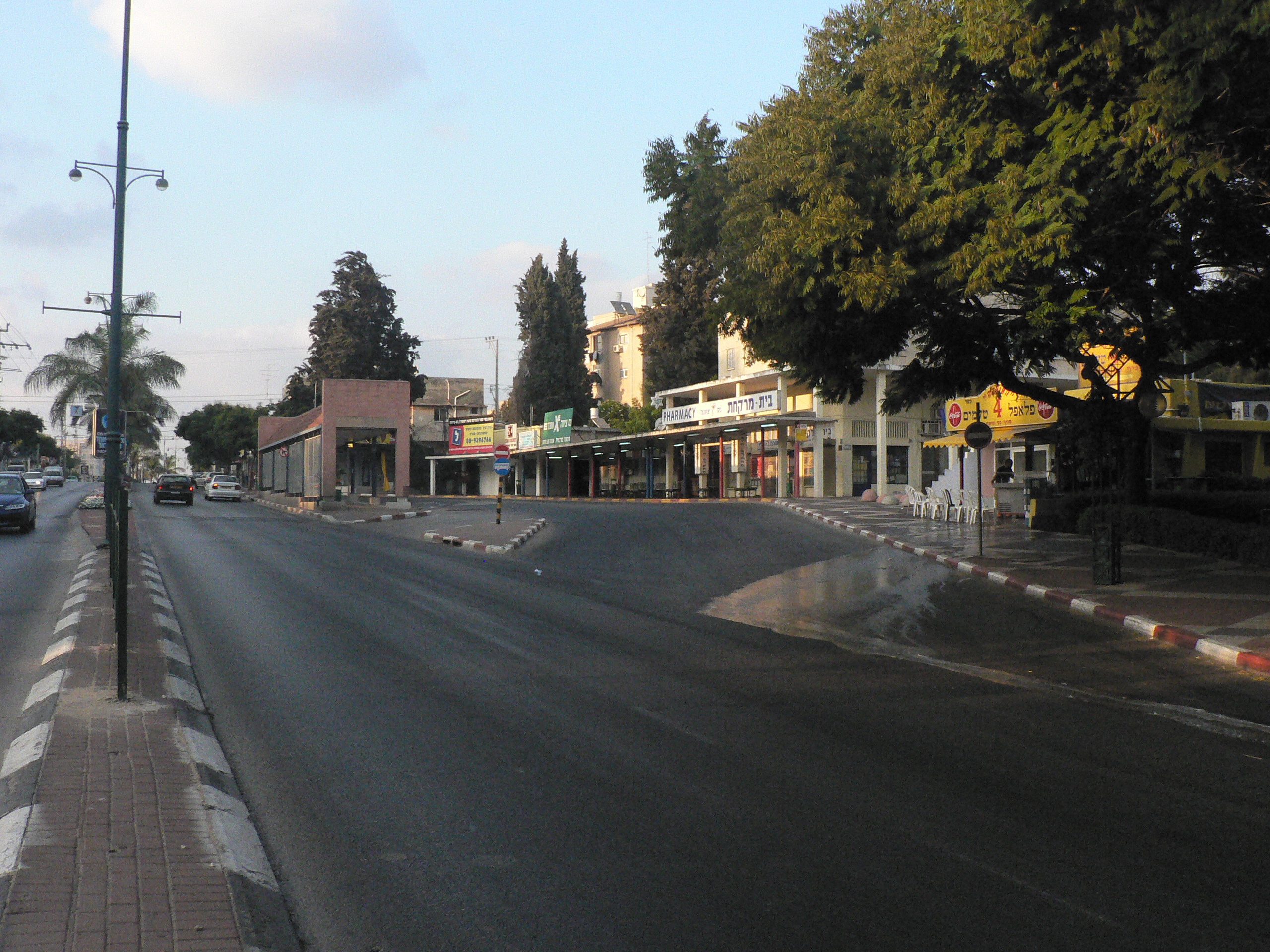 Ness Ziona נס ציונה Centeral Bus Station התחנה המרכזית